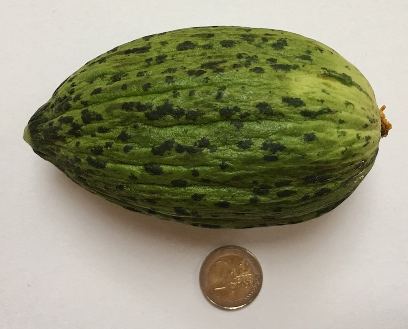 unreif geerntete Zuckermelone